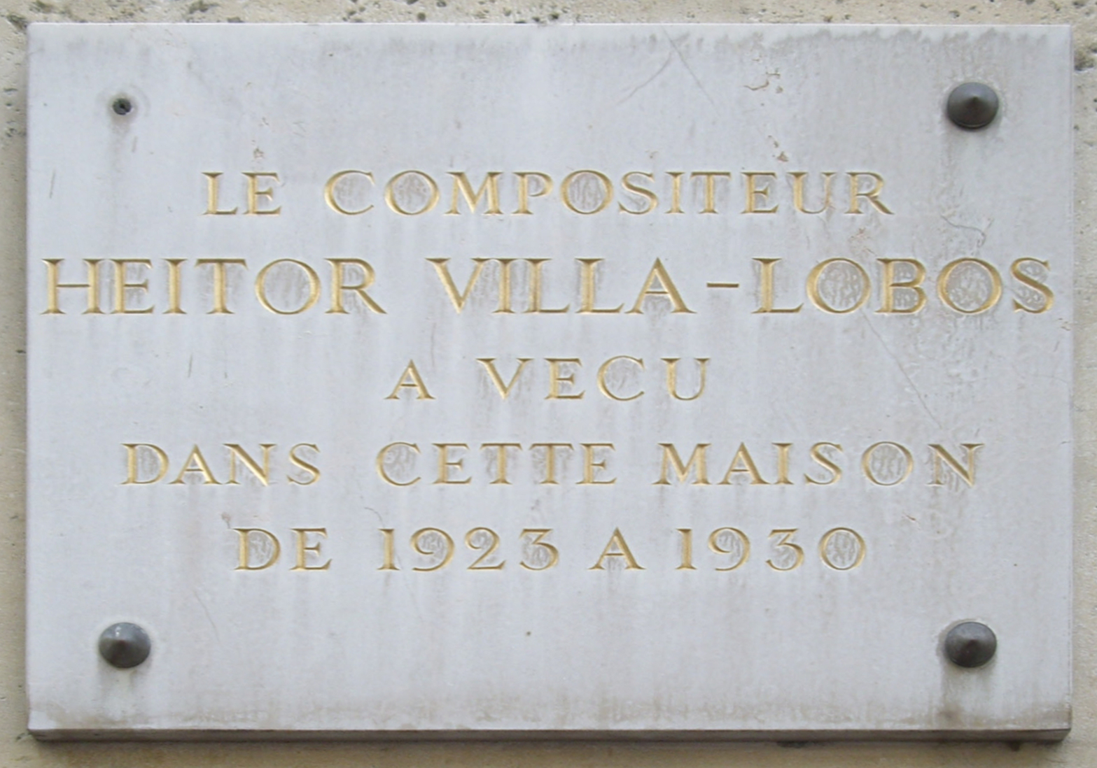 Plaque apposée au n° 11-13 de la place Saint-Michel, Paris 6e, où vécut le compositeur Heitor Villa-Lobos (1887-1959) de 1923 à 1930.